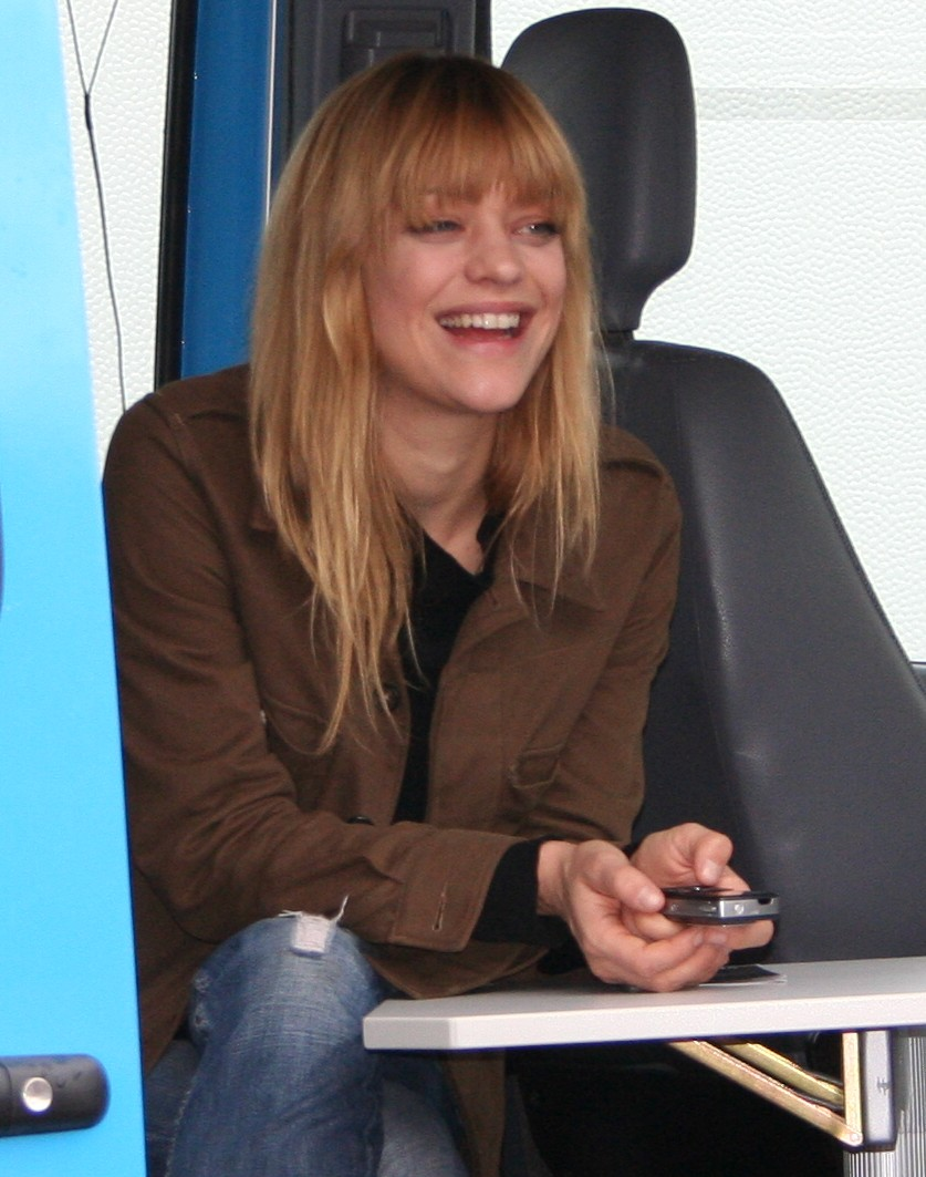 Heike Makatsch auf der Frankfurter Buchmesse 2005